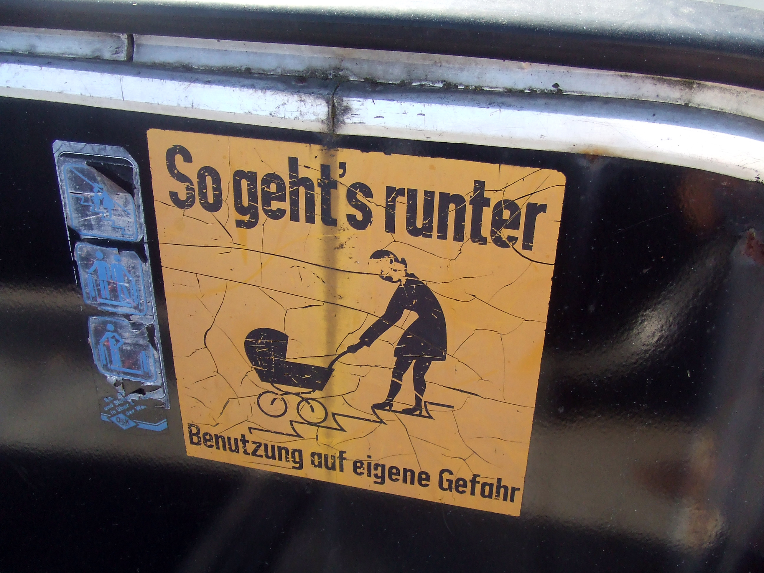 Illustration an einer Rolltreppe an der Unterführung am Wiesbadener Hauptbahnhof